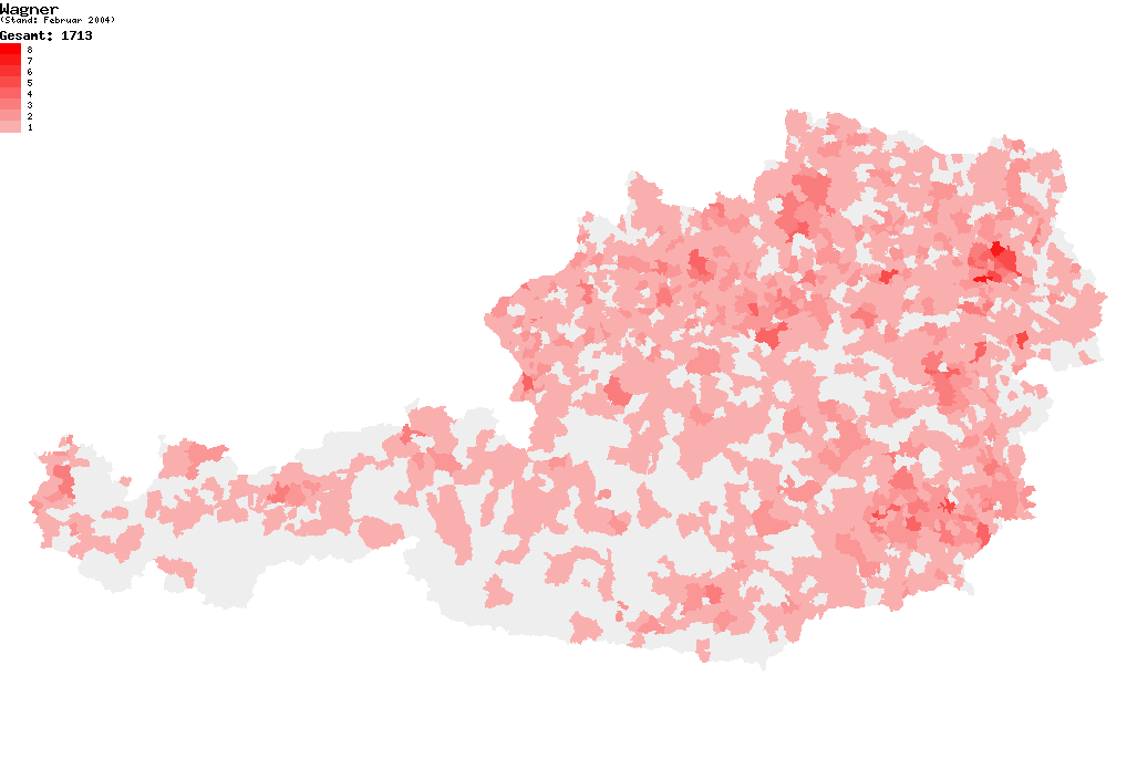 Verteilung des Nachnamens Gruber in Österreich nach dem Telefonbuch mit Stand vom Februar 2004